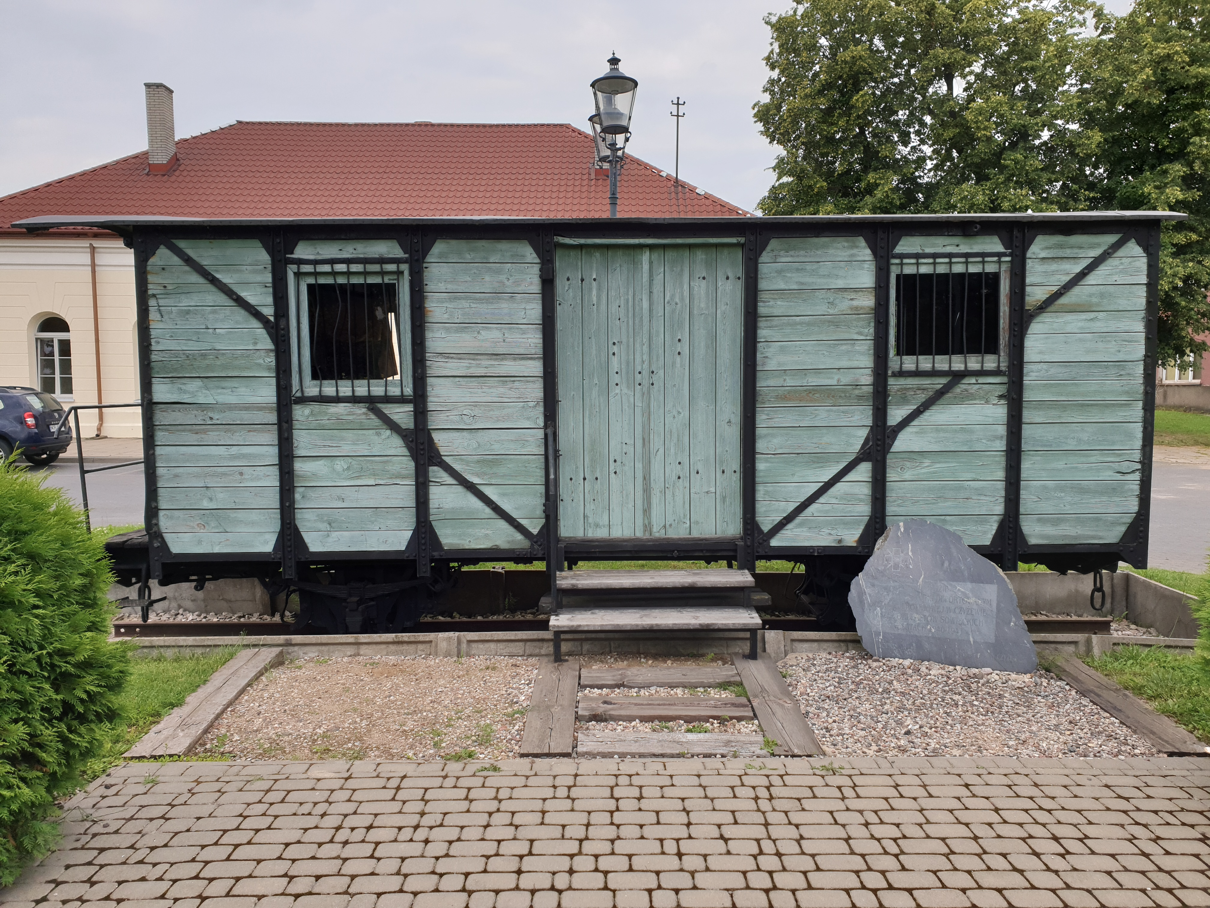 stacja kolejowa Czyżew - wagon jako pomnik złożony w hołdzie Sybirakom deportowanym z Czyżewa w latach 1940-41